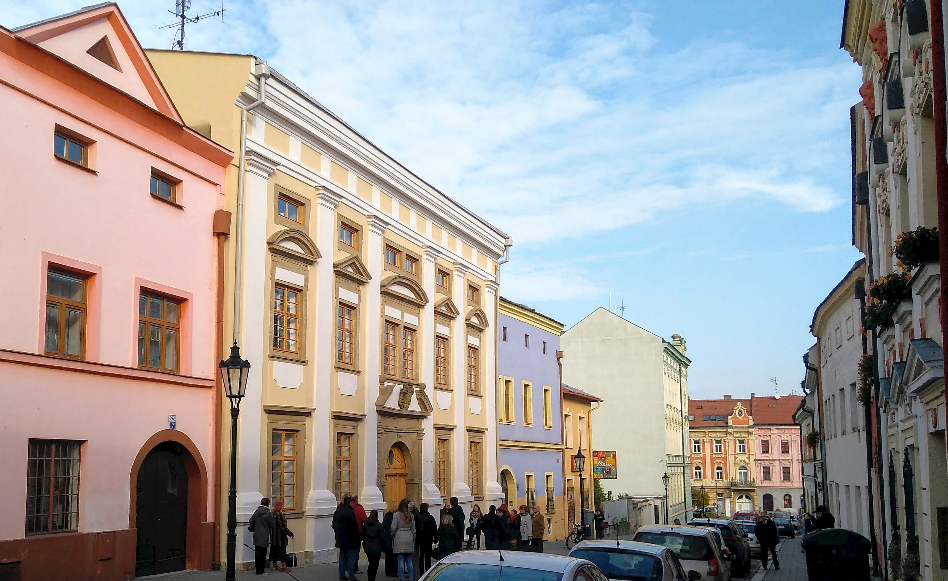 Židovský obecní dům, Moravcova 259/9, instalace Kamenů zmizelých rodiny posledního kroměřížské rabína Joachima Astela Kroměříž.